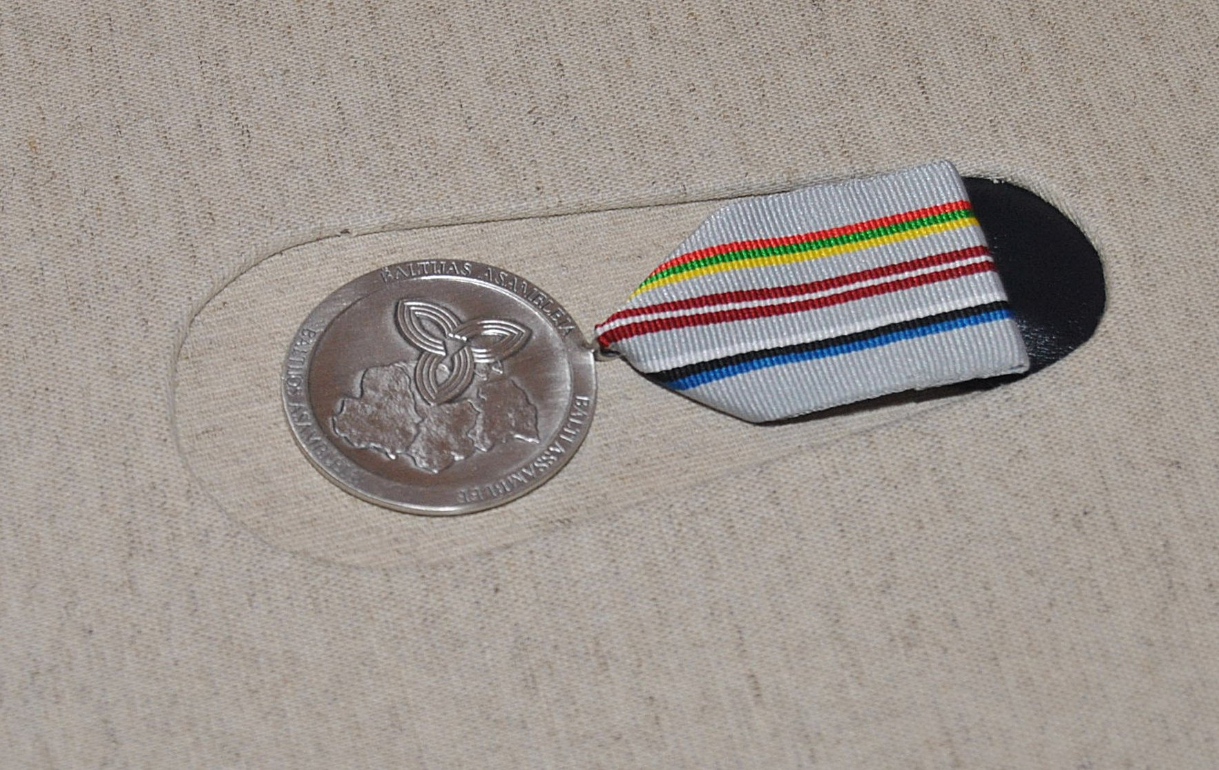 2010. gada 21. oktobris. Saeimas Baltajā zālē notiek Baltijas Asamblejas medaļu pasniegšanas ceremonija. Attēlā Baltijas Asamblejas medaļa. Foto: Saeima